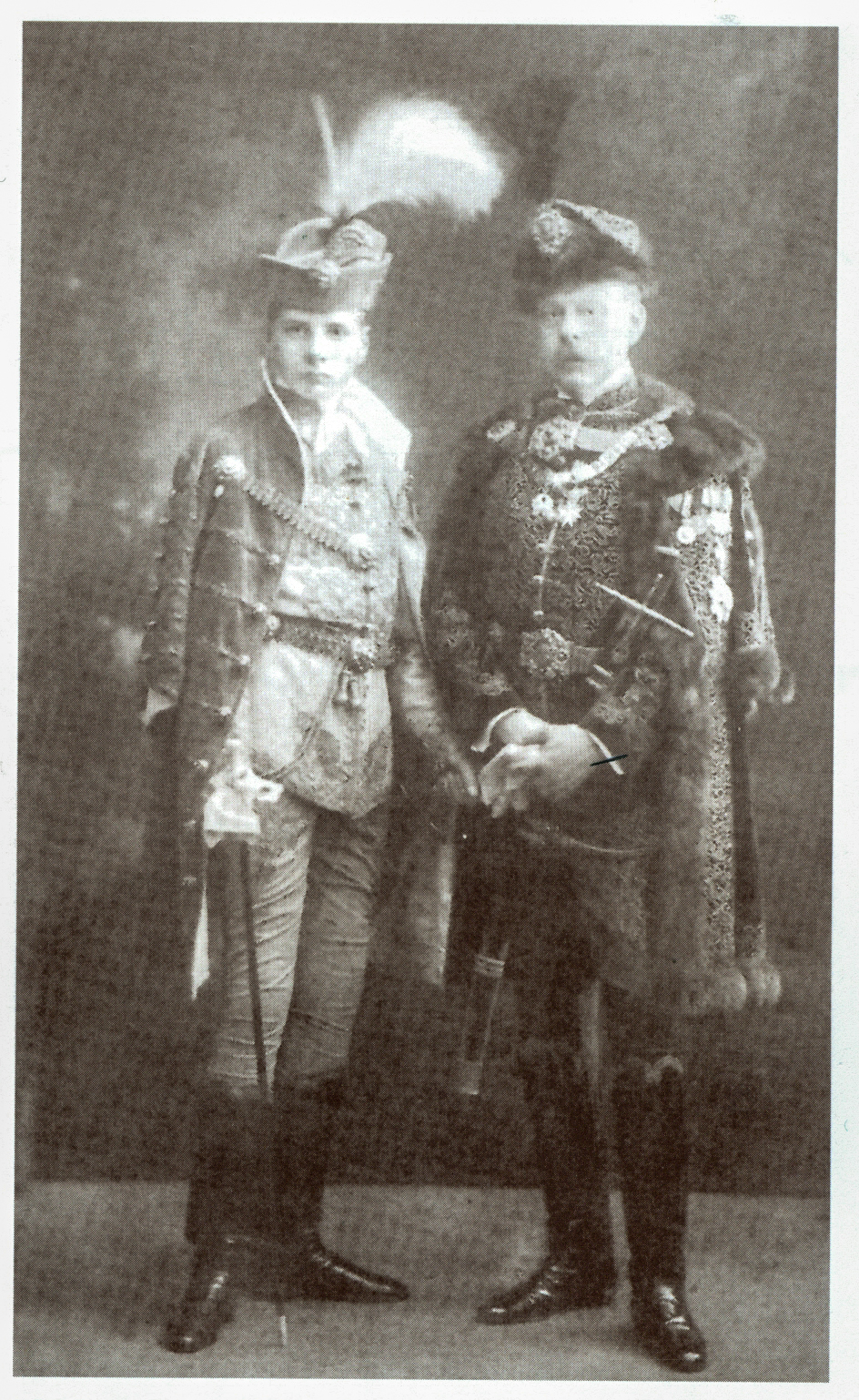 Nikolaus IV. Esterházy and his son, Paul V. in court dress